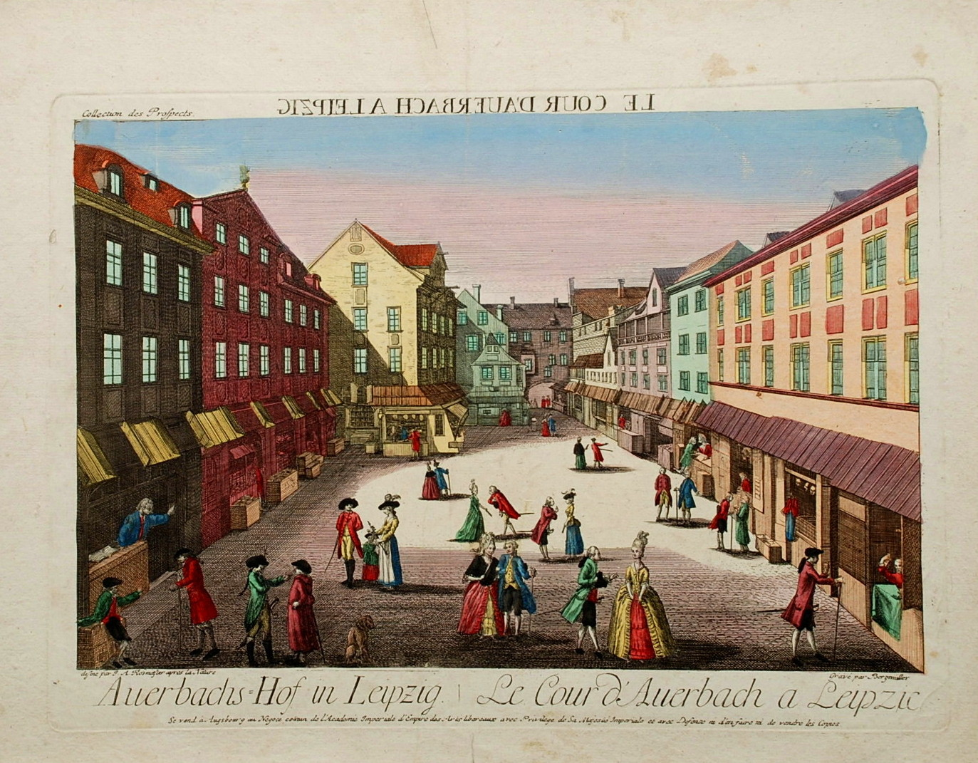 Auerbachs Hof in Leipzig um 1780. Altkolorierter Kupferstich (Guckkastenblatt - deshalb seitenverkehrt!) 29,1 x 40,3 cm Plattenrand. Dargestellt ist der Naschmarkt, der, wenn keine Leipziger Messe war, seinen Platz in Auerbachs Hof hatte. Gestochen von Johann Baptist Bergmüller (1724 - 1785; THIEME-BECKER Bd. 3, S.411) nach einer Zeichnung von Johann August Rosmäßler (1752 - 1783; THIEME-BECKER Bd. 29, S. 77)